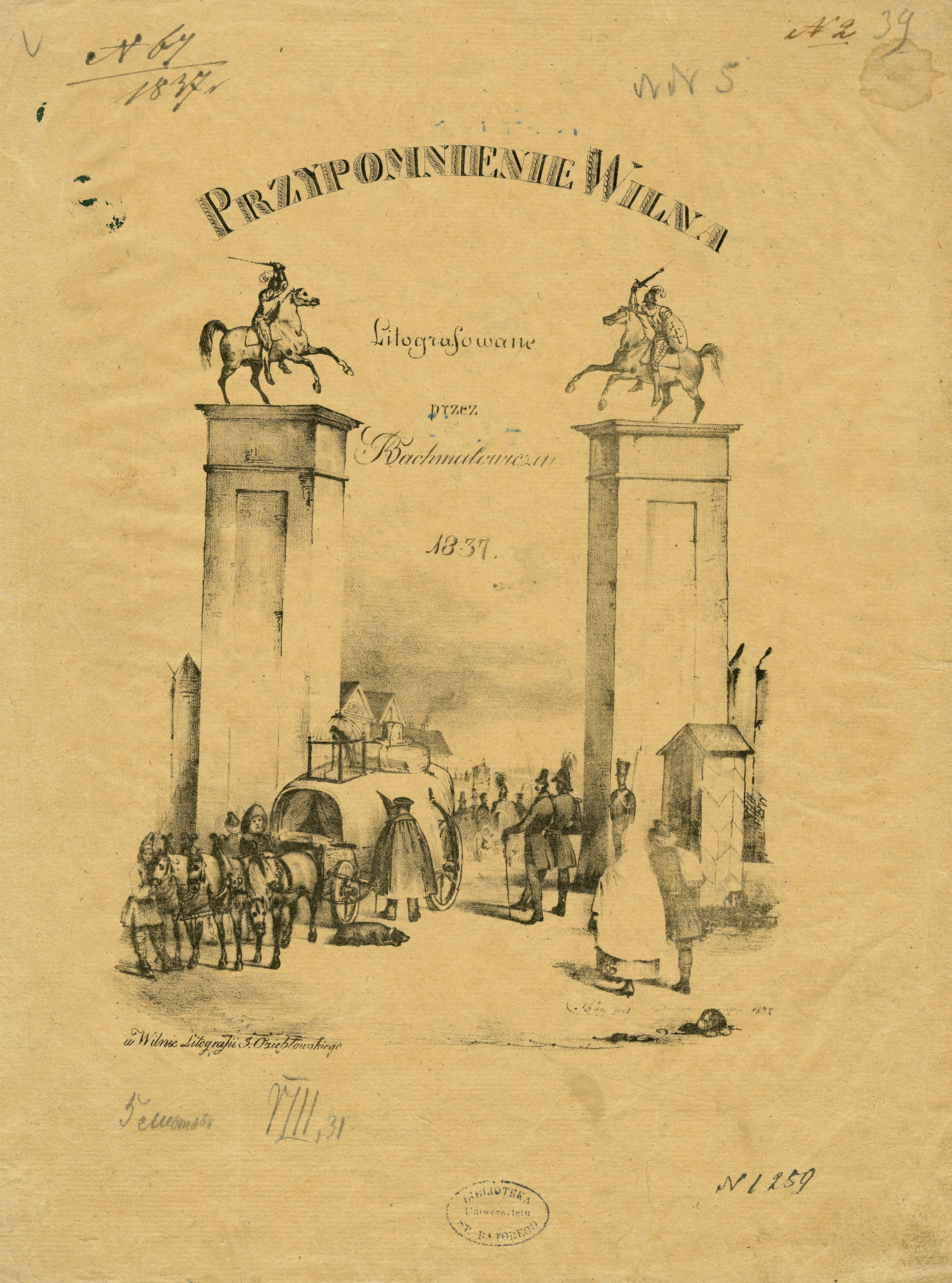 Беларуская (тарашкевіца): Вільня (Vilnia), Антокаль (Antokal). Пагоня (Pahonia)